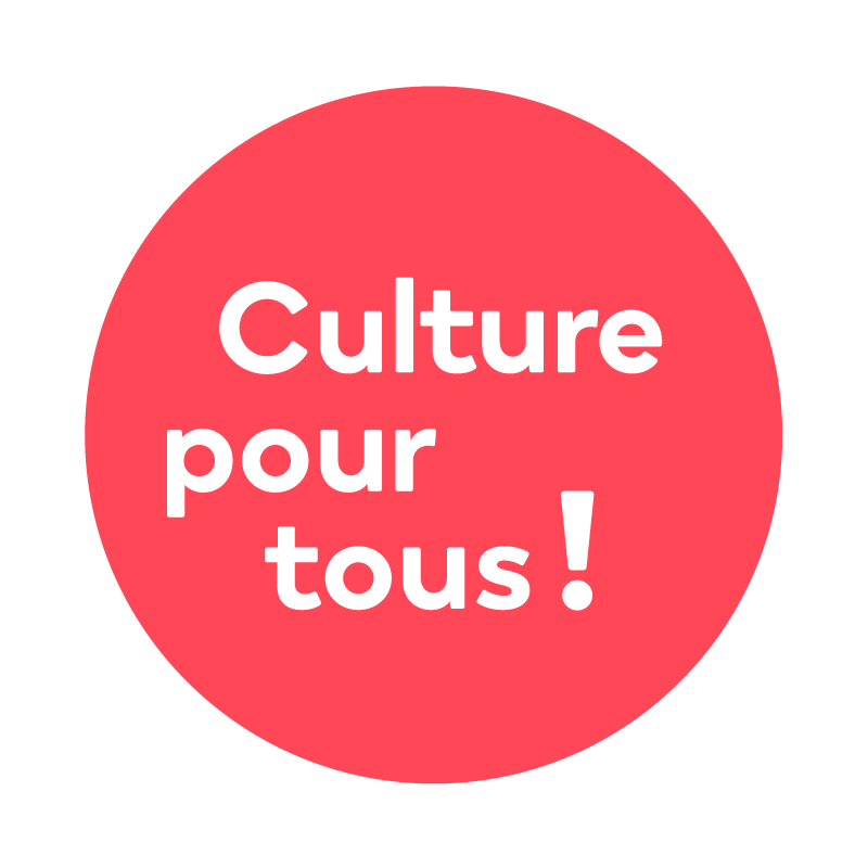 Logo Culture pour tous